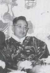 장택상 사진 (1953년 이전)